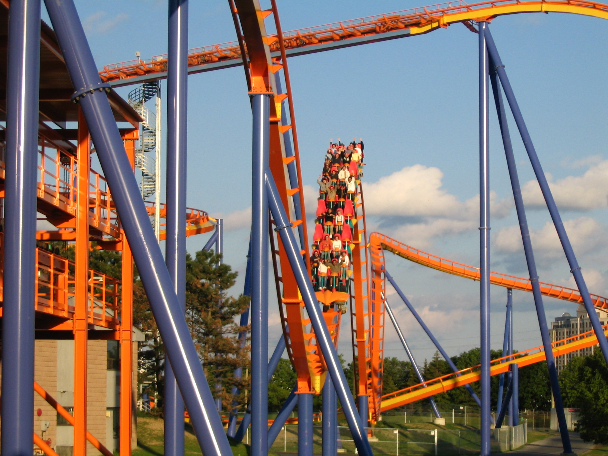 Train sur la dernière bosse de Behemoth, à Canada's Wonderland (Vaughan, Ontario, Canada).